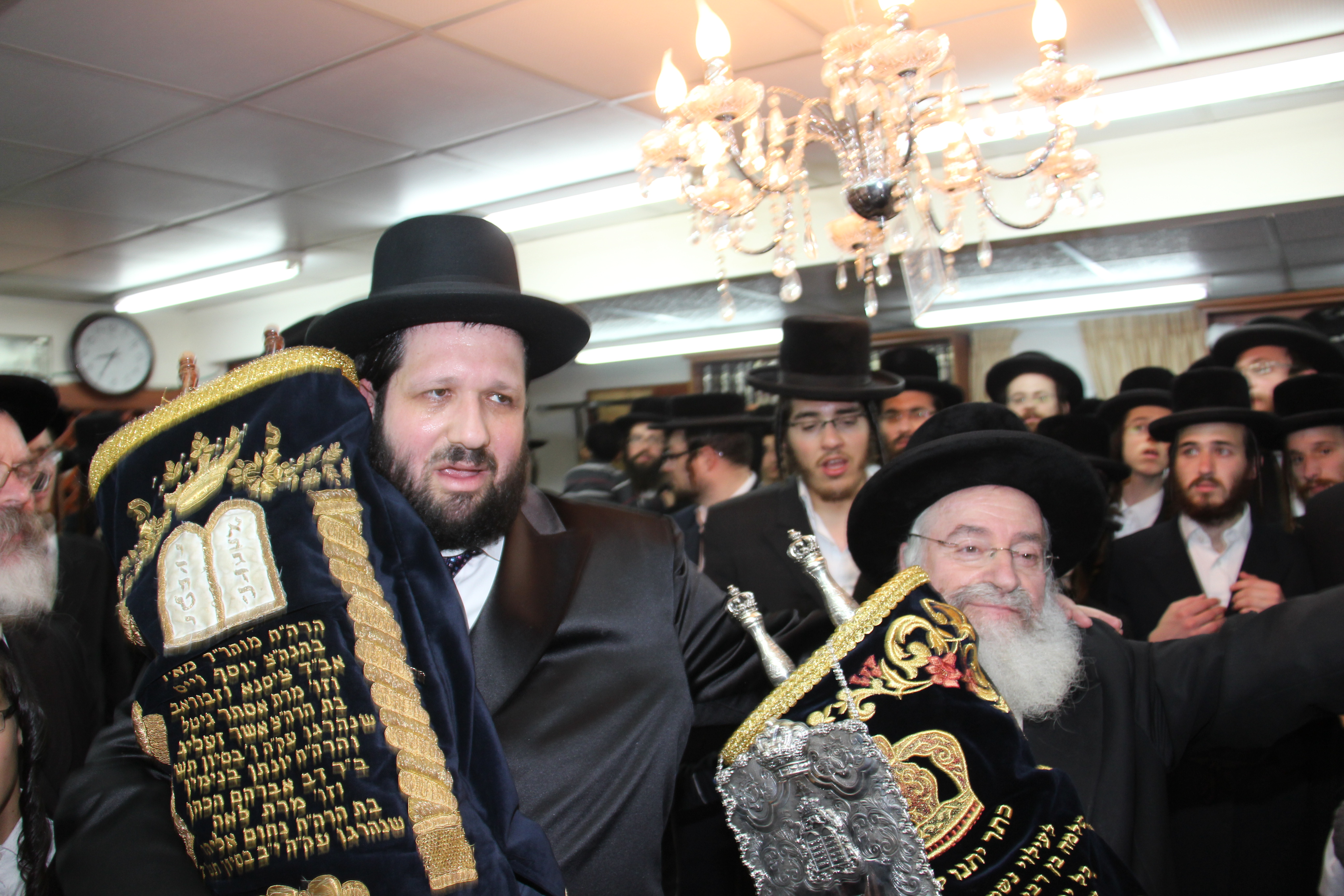 Sefer Torah in memory of Rabbi Shlomo Shtenzel in Beitar Illit Featuring Rabbi Asher Weiss Rabbi yonatan Shtencel